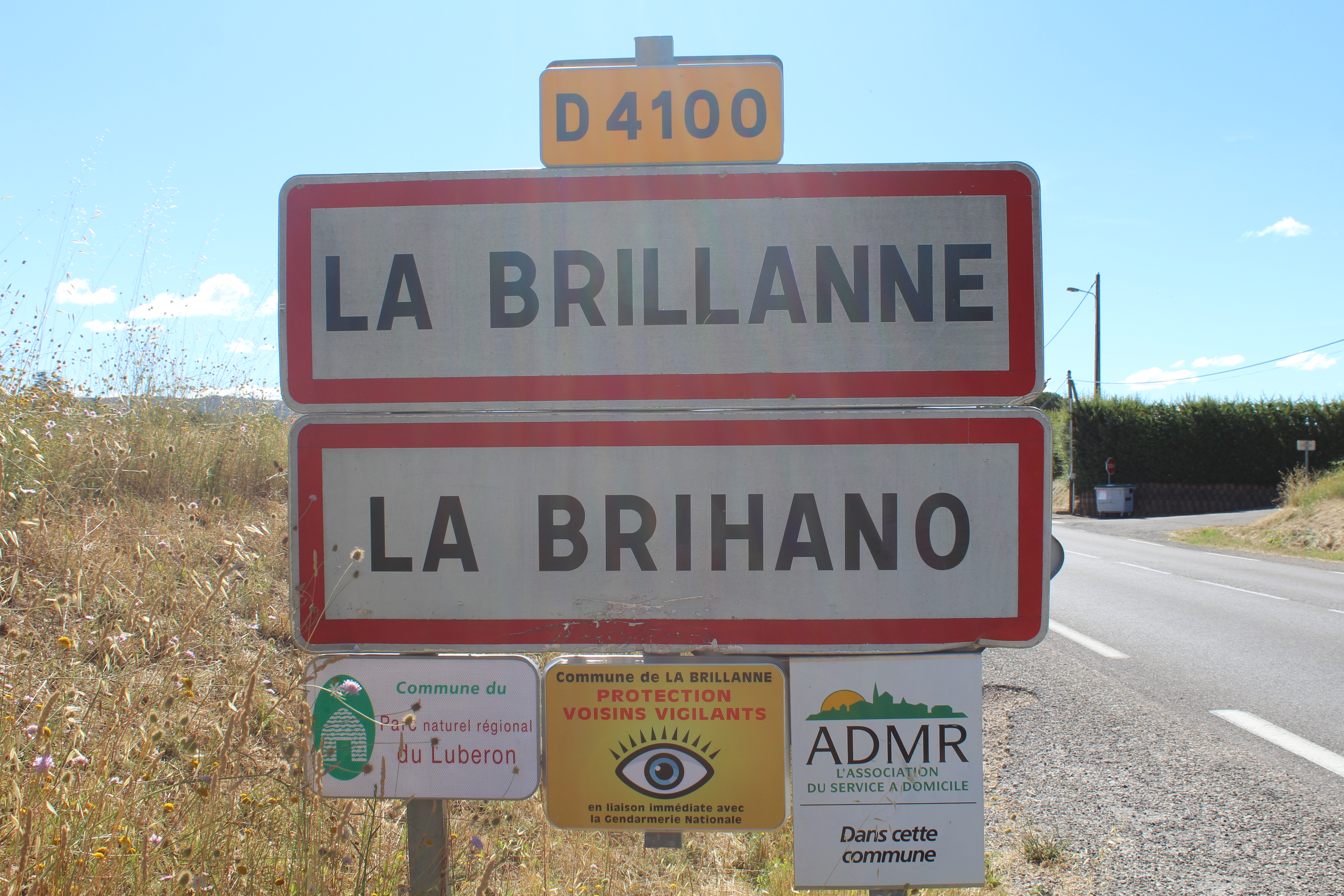 Panneau d'entrée dans La Brillanne.